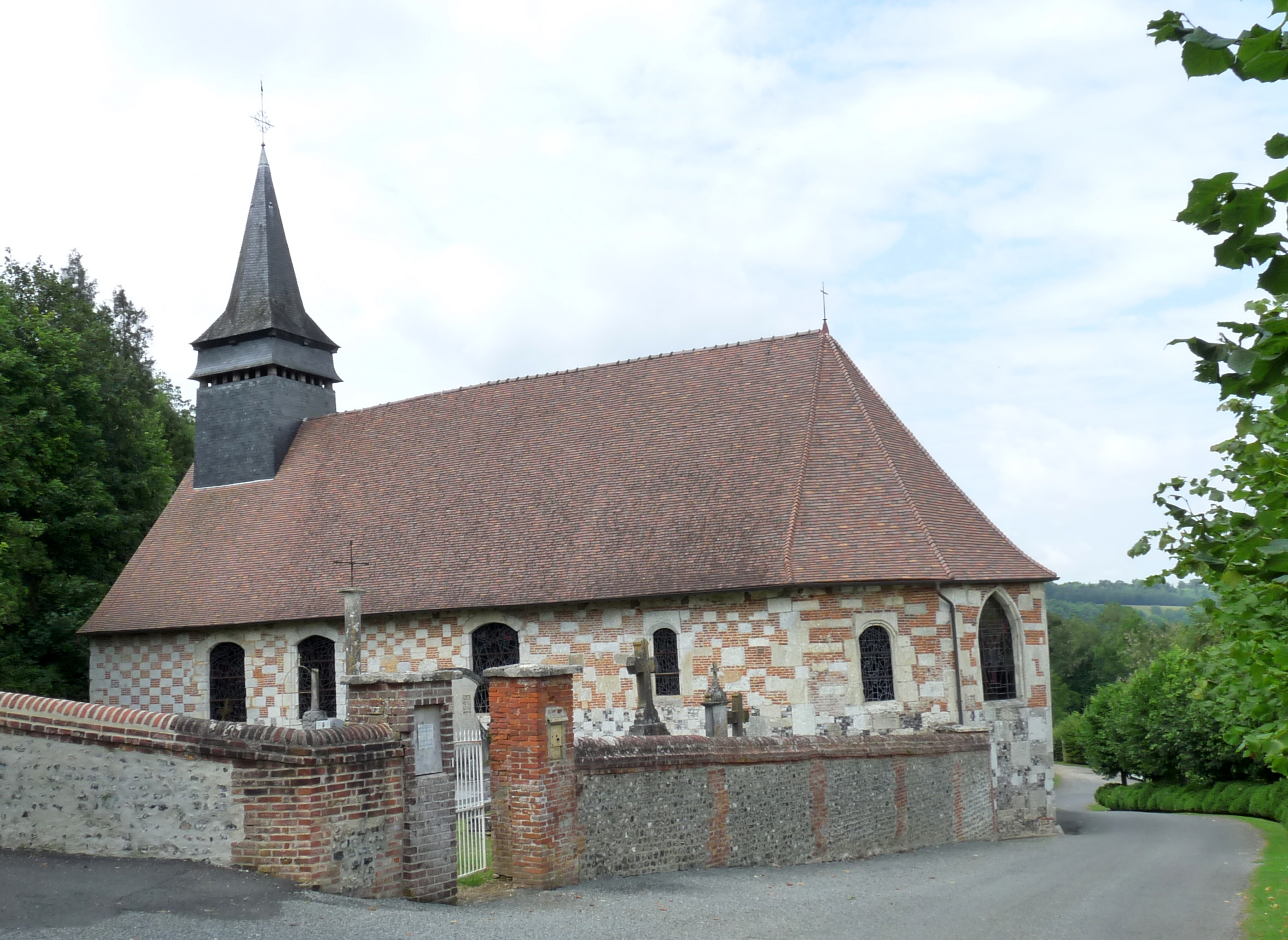 Église Saint-Ouen de Bouchevilliers .